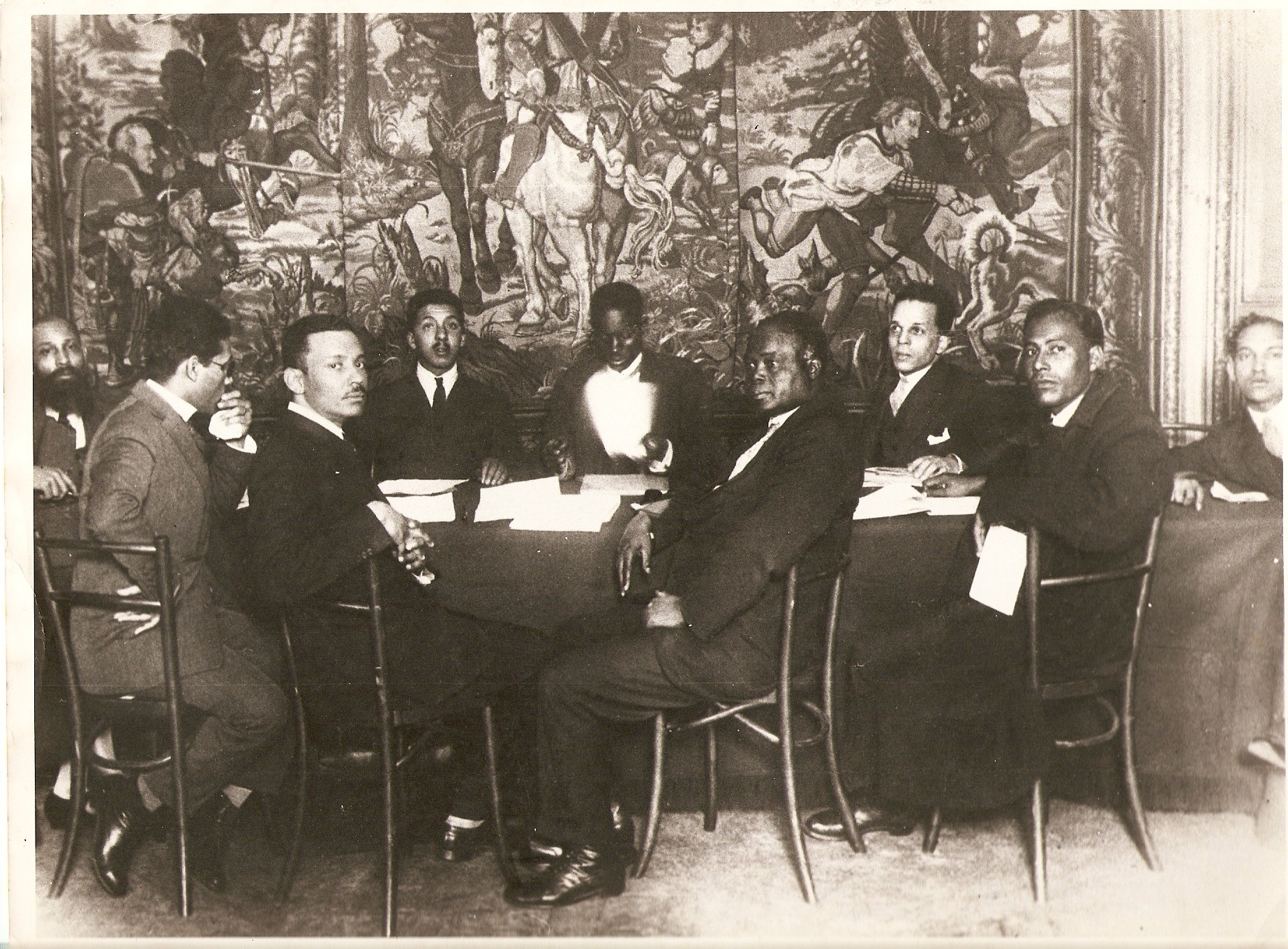 Lamine Senghor participait, ici, avec J.T.Gumdede l'ANC et autres délégués, au Congrès international contre l'oppression coloniale tenue à Bruxelles , en février 1927